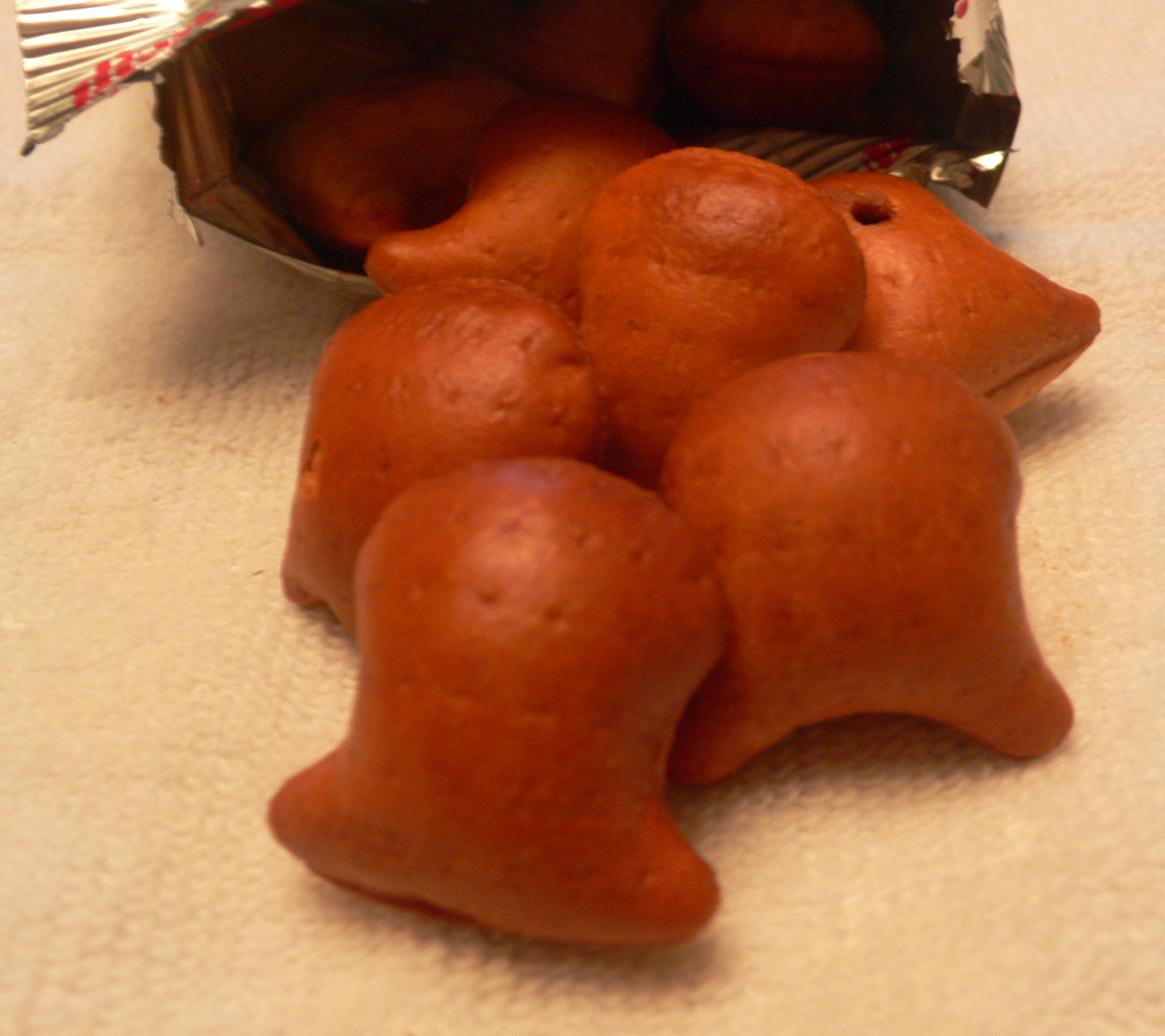 明治製菓株式会社が製造しているチョコレート菓子「プッカ」の外観。 ・「ファイル:Koala's March.jpg」を参考にさせていただきました。 ・写真の大きさは原寸大ではありません。